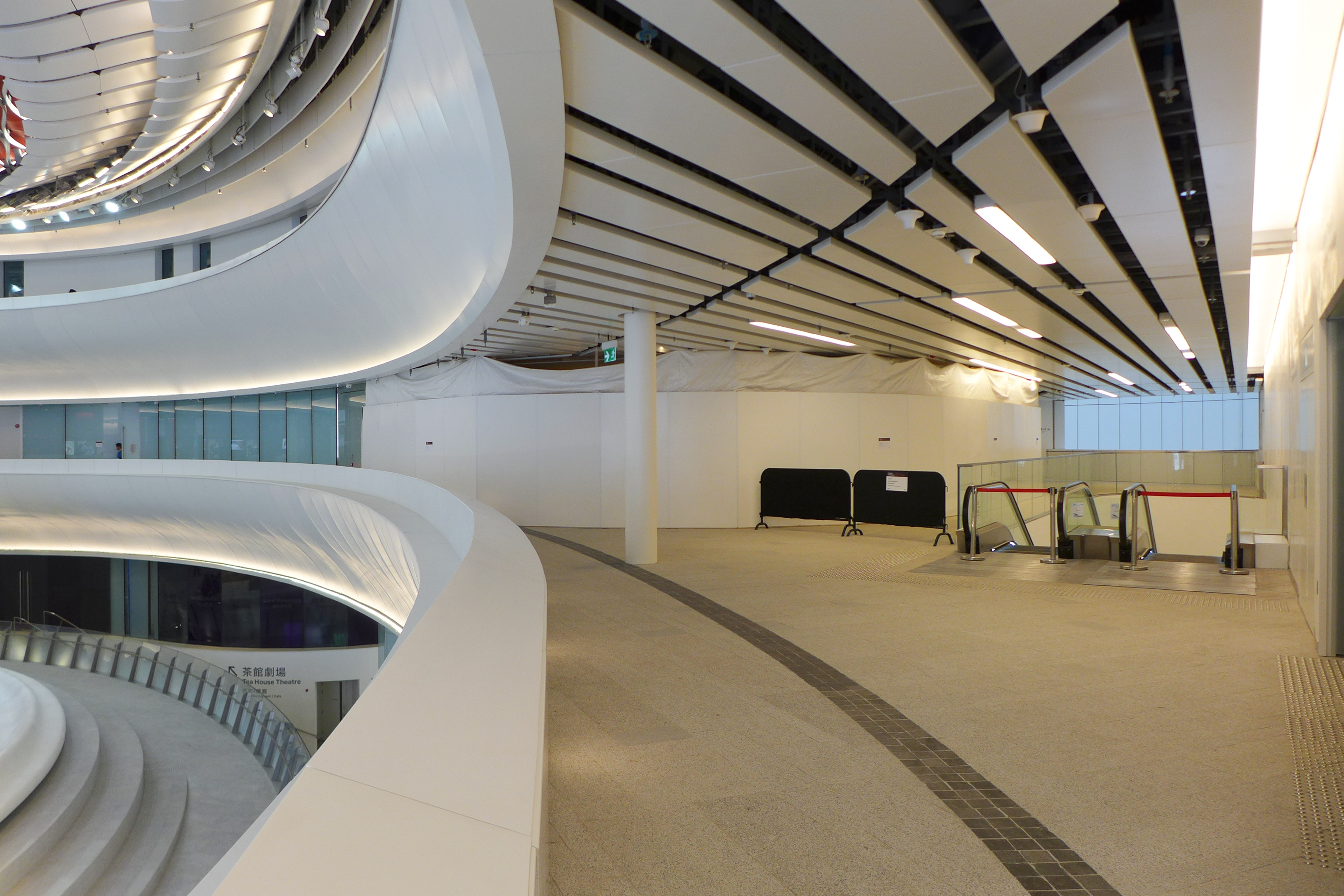 Xiqu Centre Level 1 vacant shop